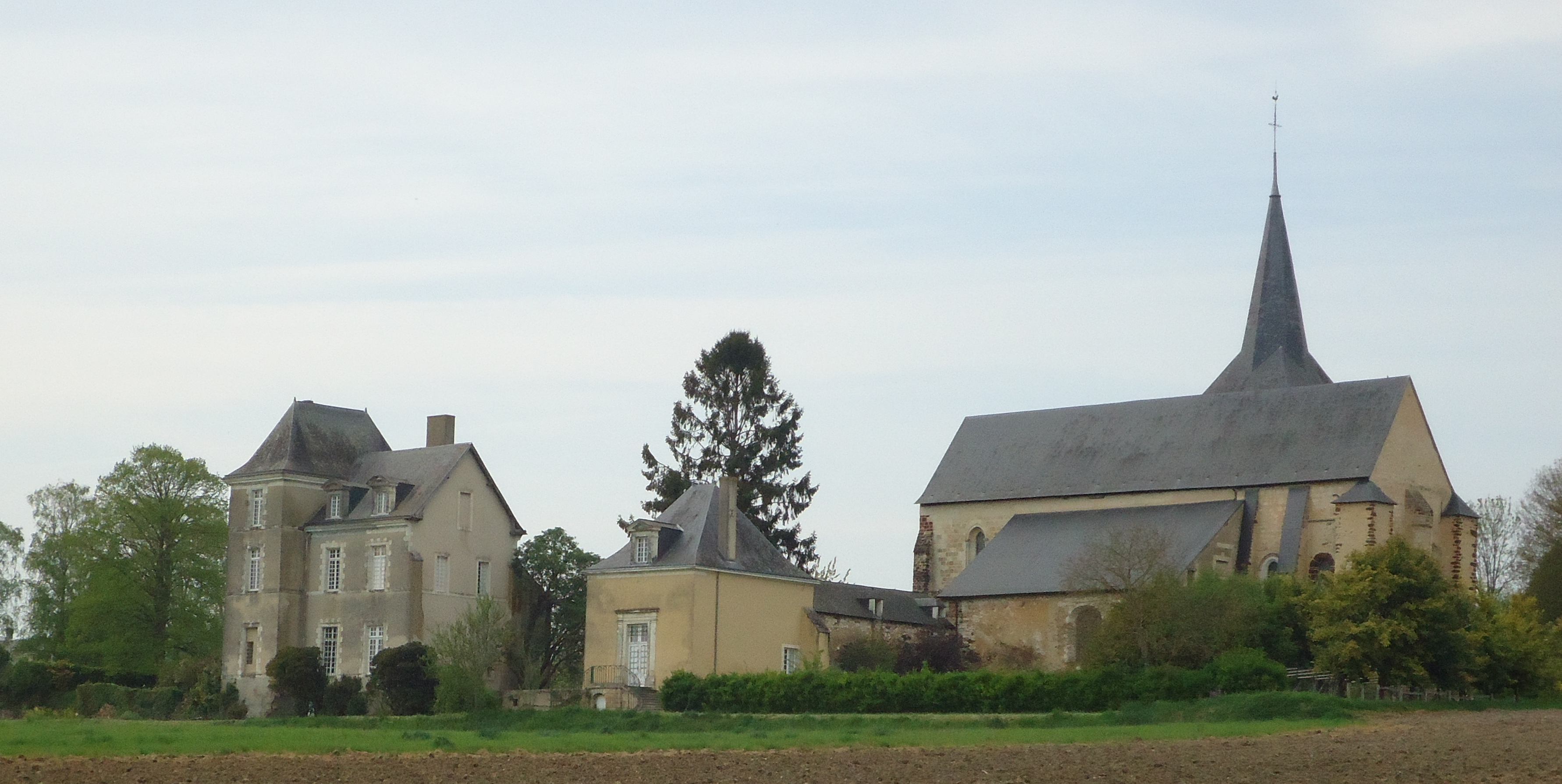 Ancien prieuré des XIIe, XIIIe, XVe & XVIe (Part. ISMH & MH)